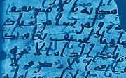 kopie 7e eeuwse koraa uit Sannaa